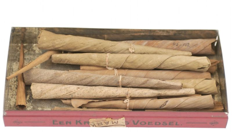 Sigaret. Dit zijn sigaretten van bananenblad, gevuld met medicinale kruiden als damar (hars), pala (nootmuskaat), jinten (komijn), cengkeh (kruidnagel) en tabak. Het roken ervan geeft verlichting bij voorhoofdsholte ontstekingen.. Medicinale sigaretten in een doos Unknown language: Ruko siawan